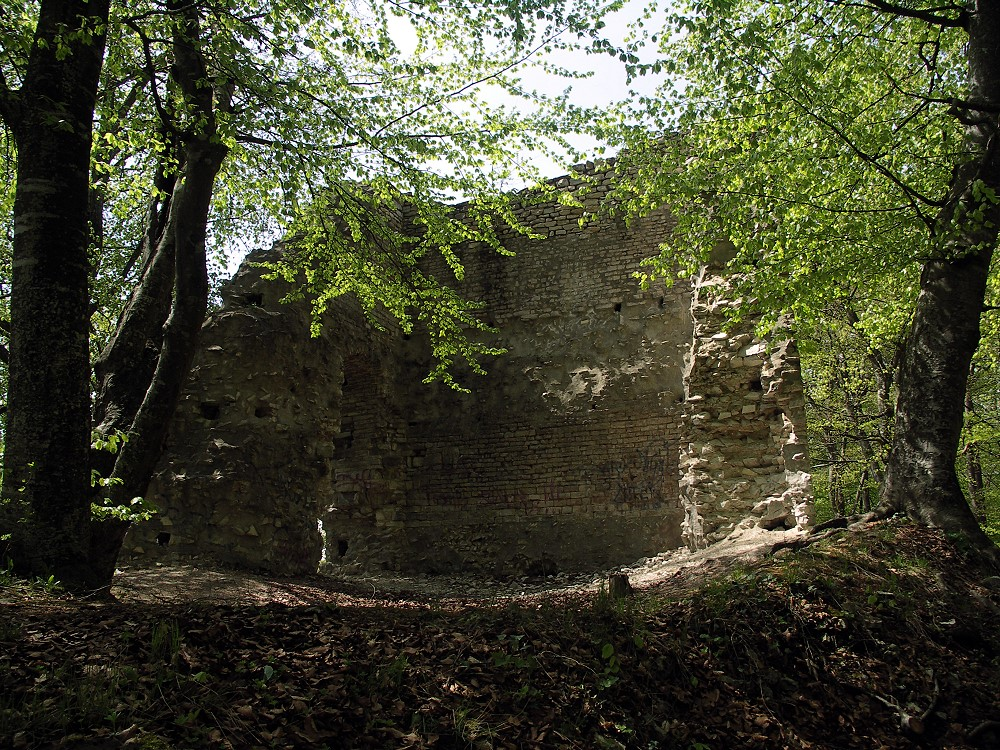 Alter Turm Aach